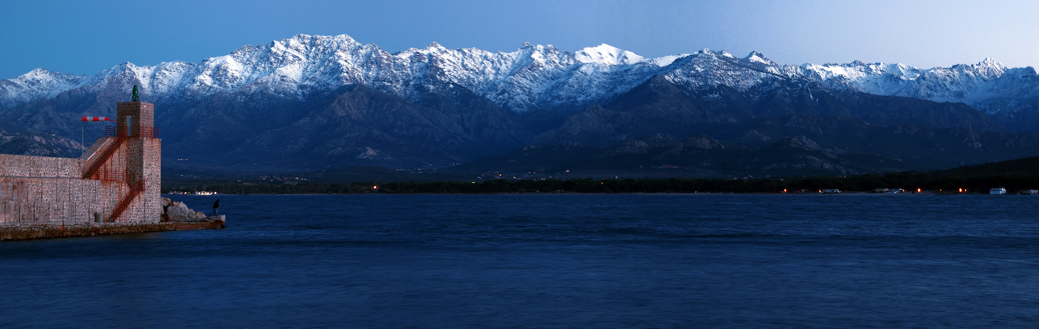 Calvi - Montagnes environnantes : Principaux sommets : Monte Grosso (1937 m), le Capu a u Dentu (2029 m), le Monte Corona (2143 m), la Punta Ghialla (2085 m) et tout à droite, la Punta Minuta (2556 m).